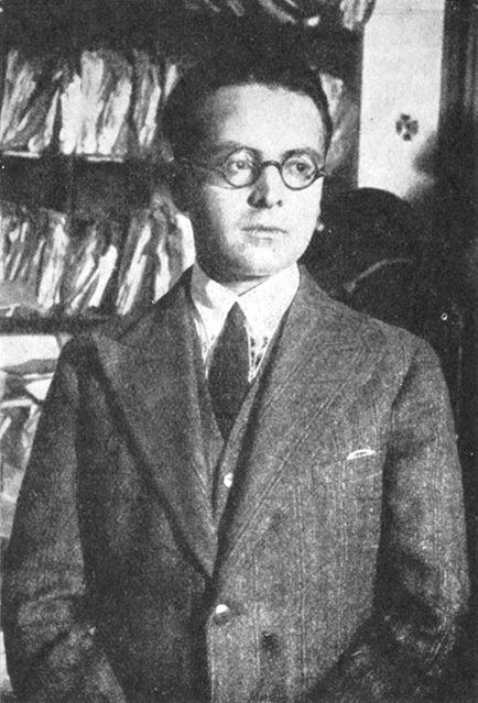 Marcel Arland (1899-1986) est un romancier, essayiste et critique littéraire français.